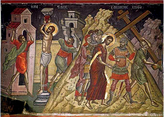 Jesus Passions